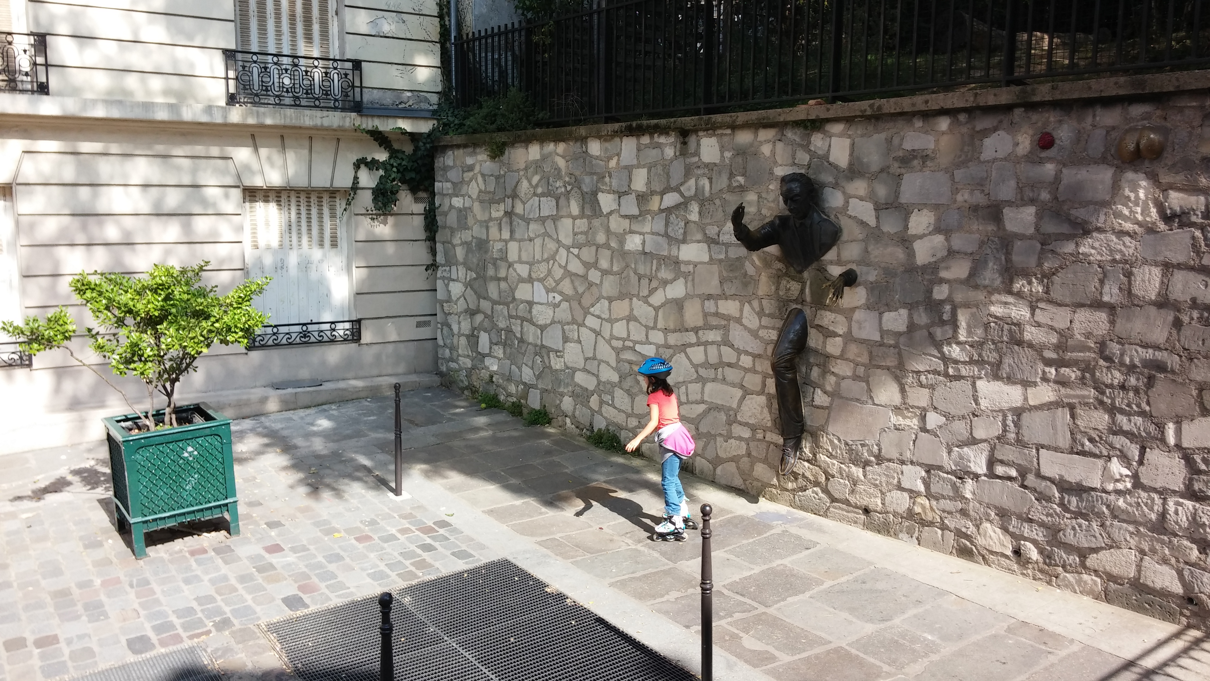 Le Passe-Muraille (statue)